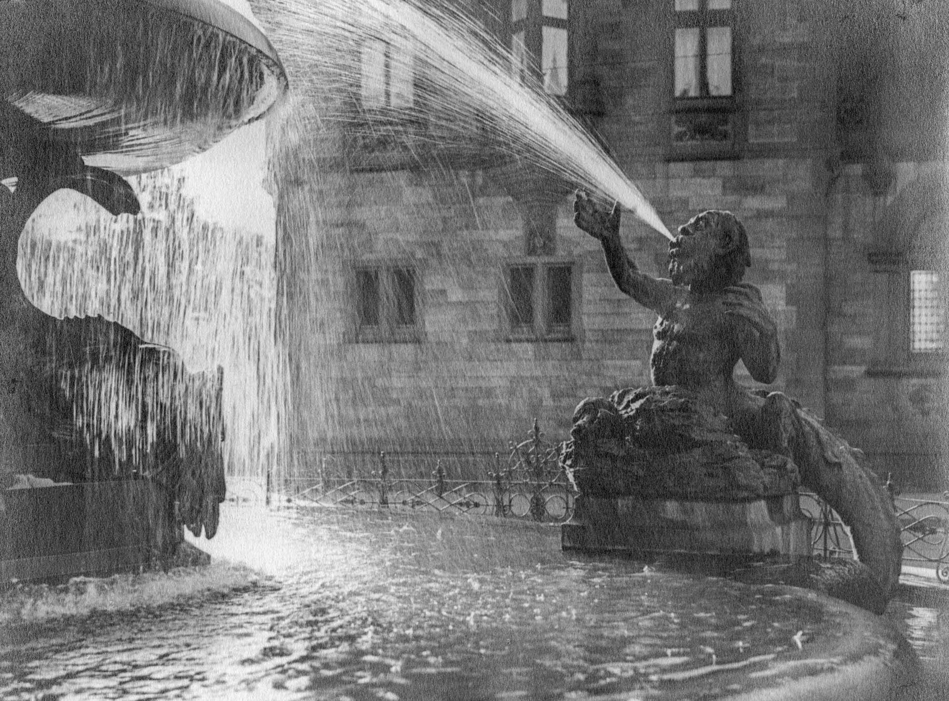 Preisgekröntes Bild von Erich Voigt von 1934. Es zeigt eine Skulptur und den Teil der Schale des Monumentalbrunnens vor der Flusswasserkunst, Himmelreich, Hannover.